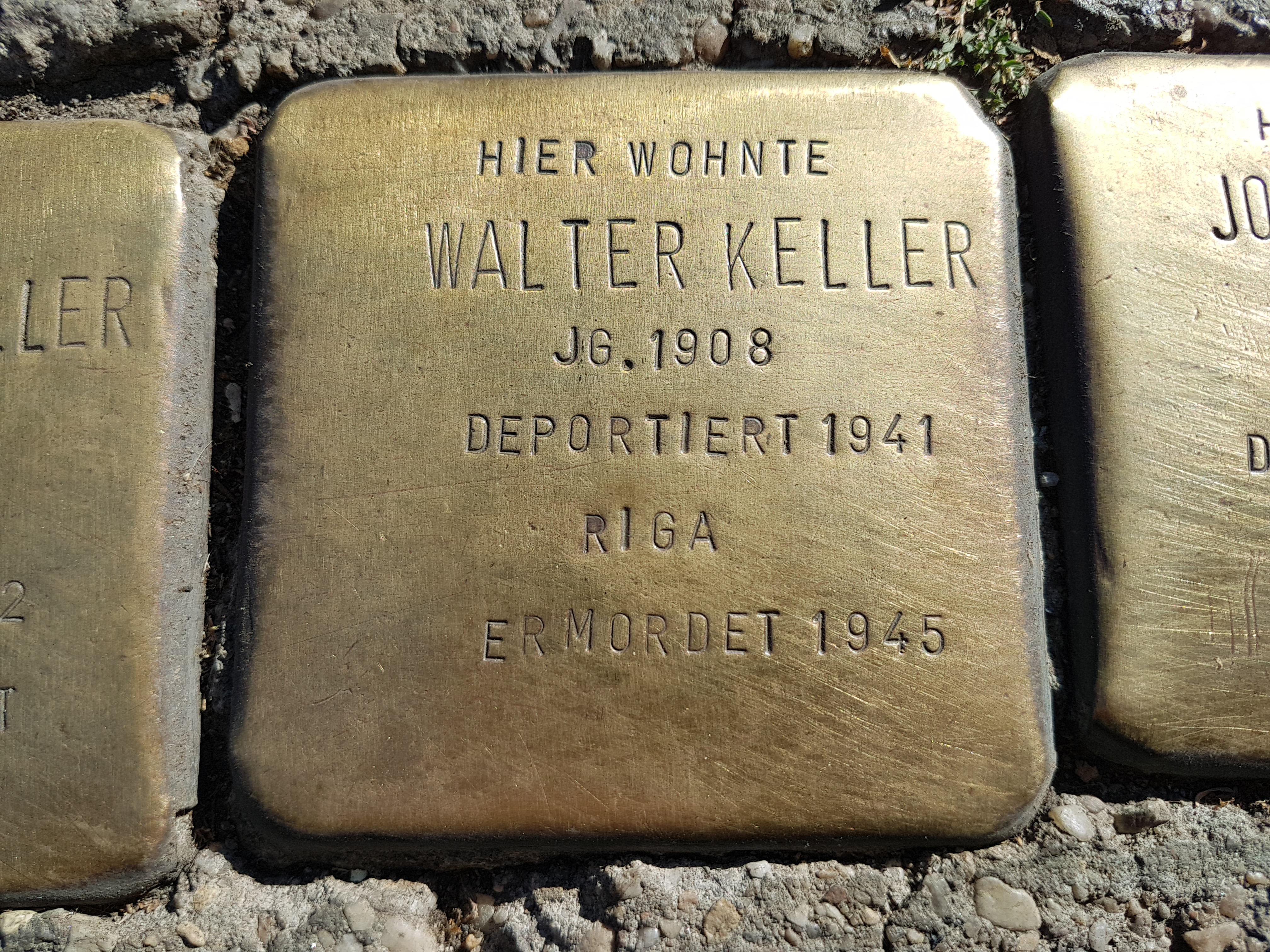 Stolperstein Duisburg Walter Keller